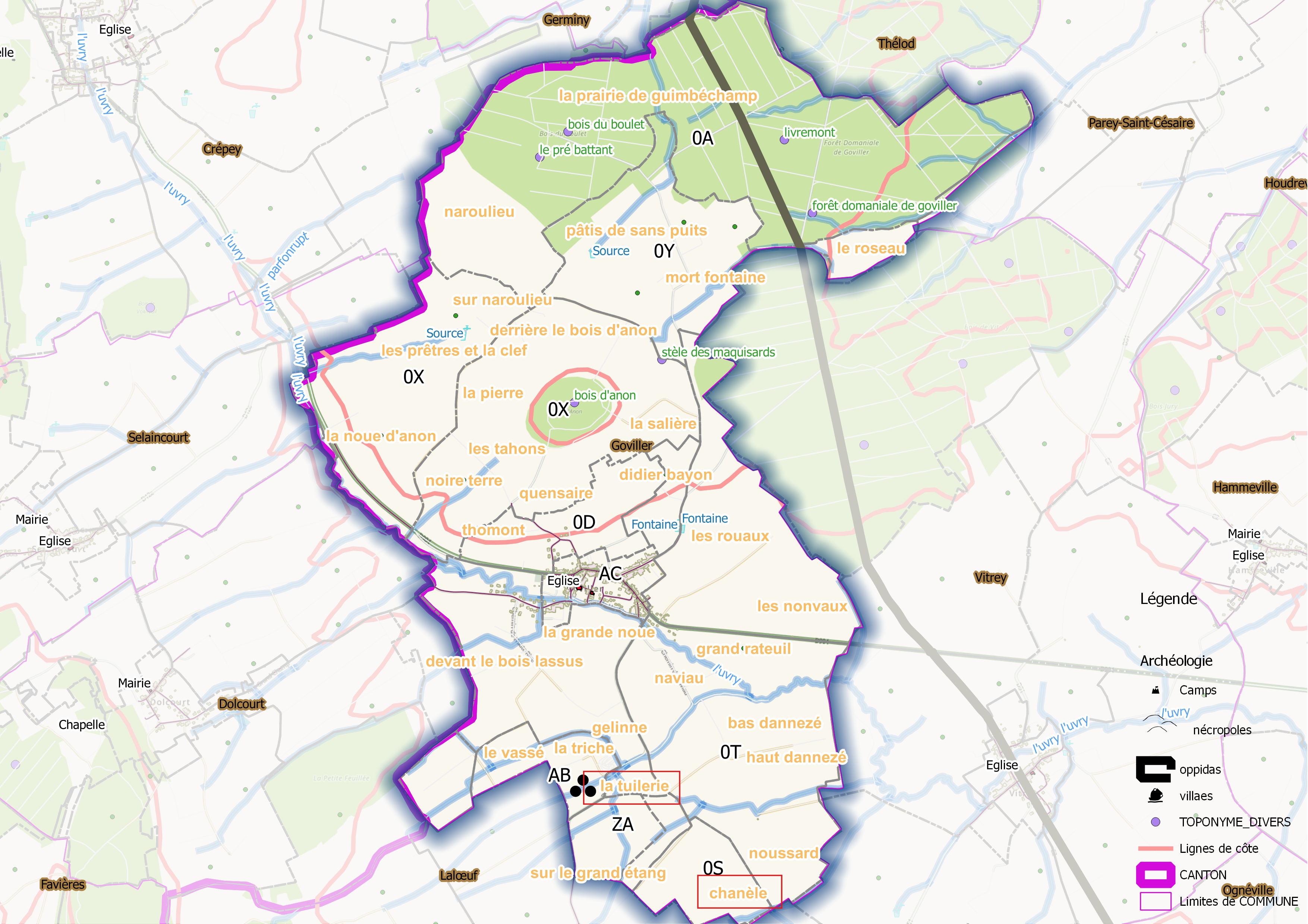 Goviller (ban communal) Osm et Qgis, mentions manuscrites